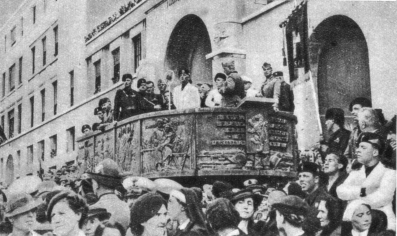 Console Malavasi ai legionari della XV legione Camicie nere Leonessa" dall'Arengario di Piazza Vittoria a Brescia il 17 agosto 1936.